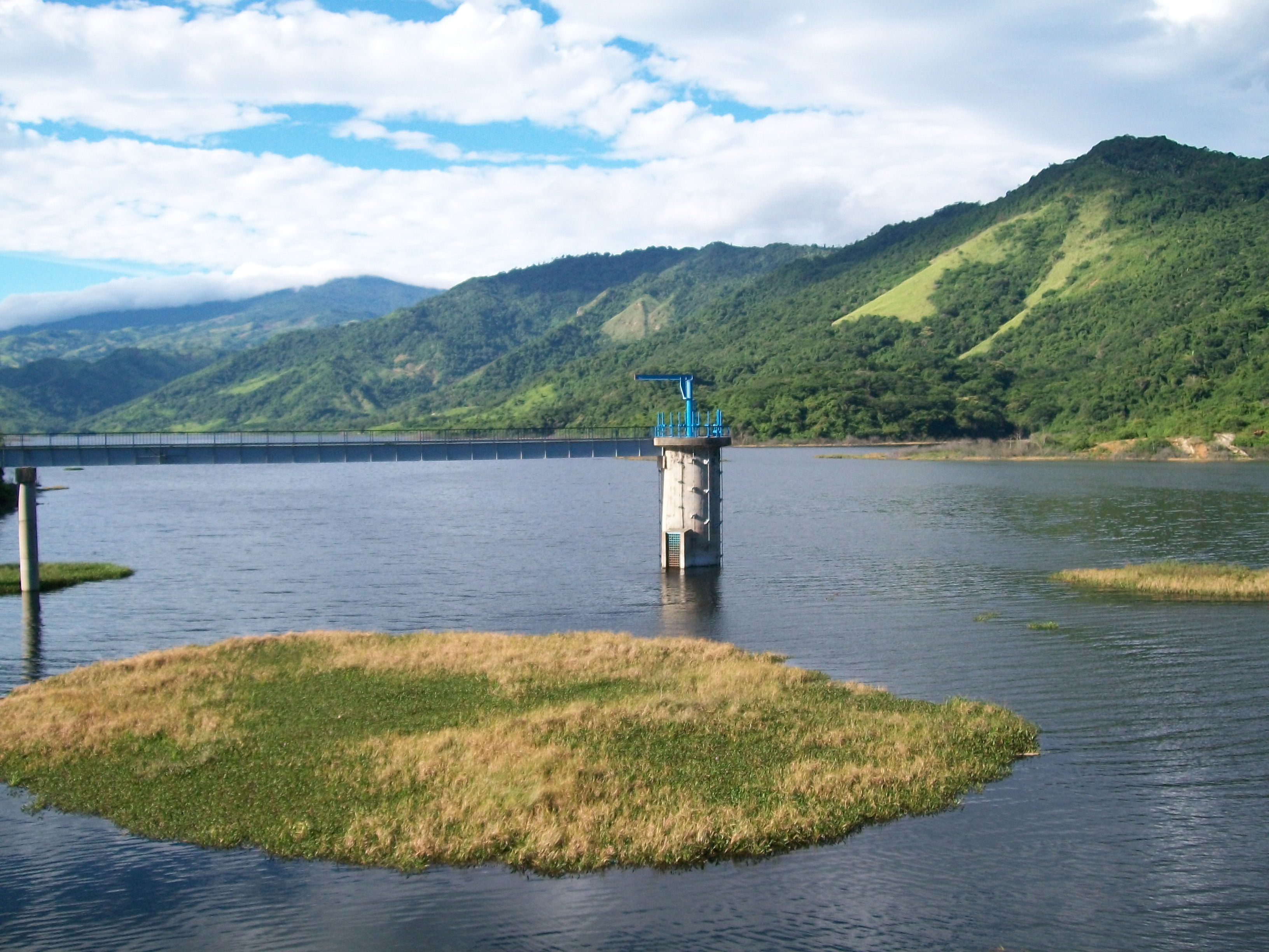 Edo. Carabobo